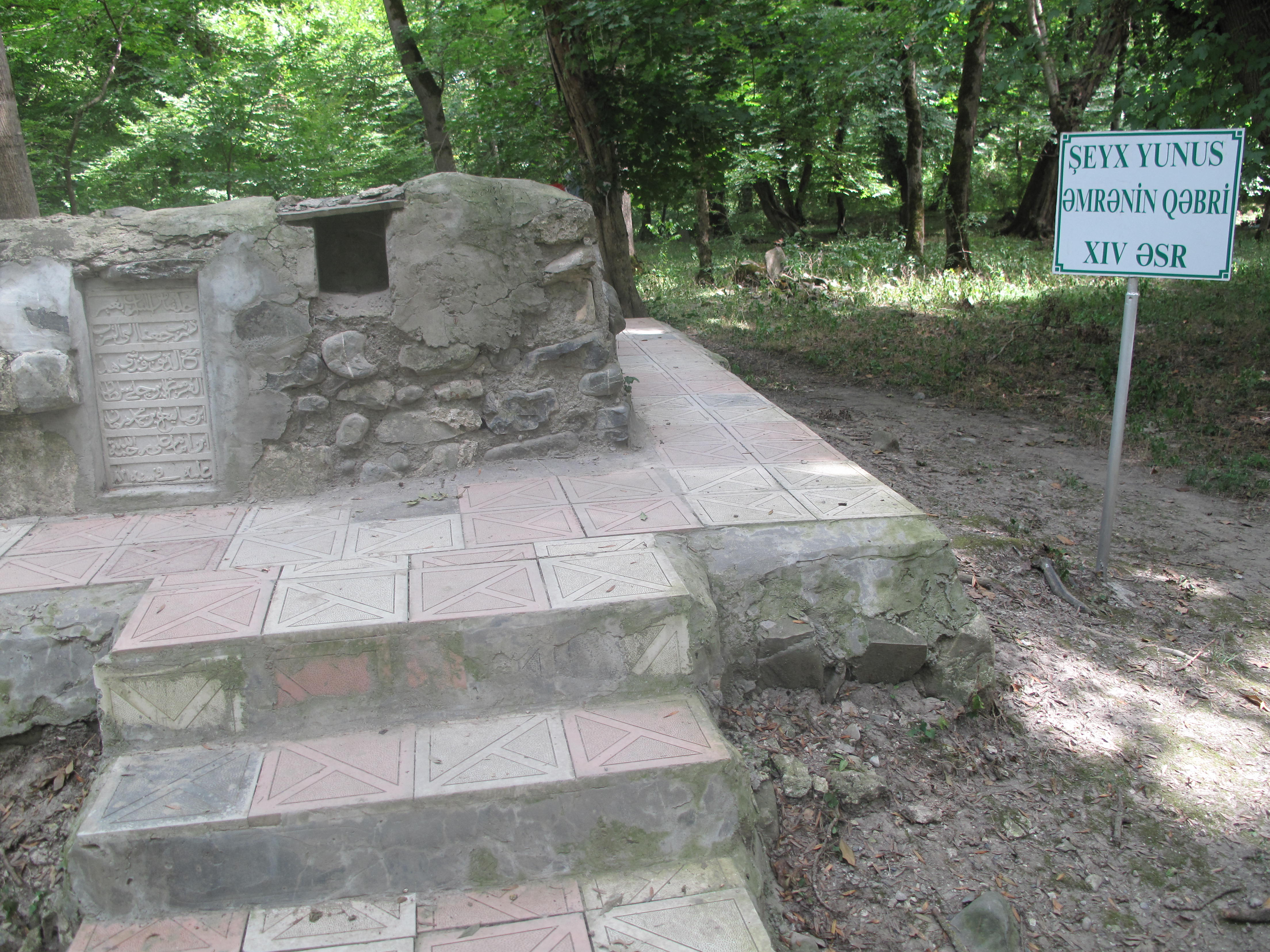 Şeyx Yunus Əmrənin qəbri. XIV əsr.